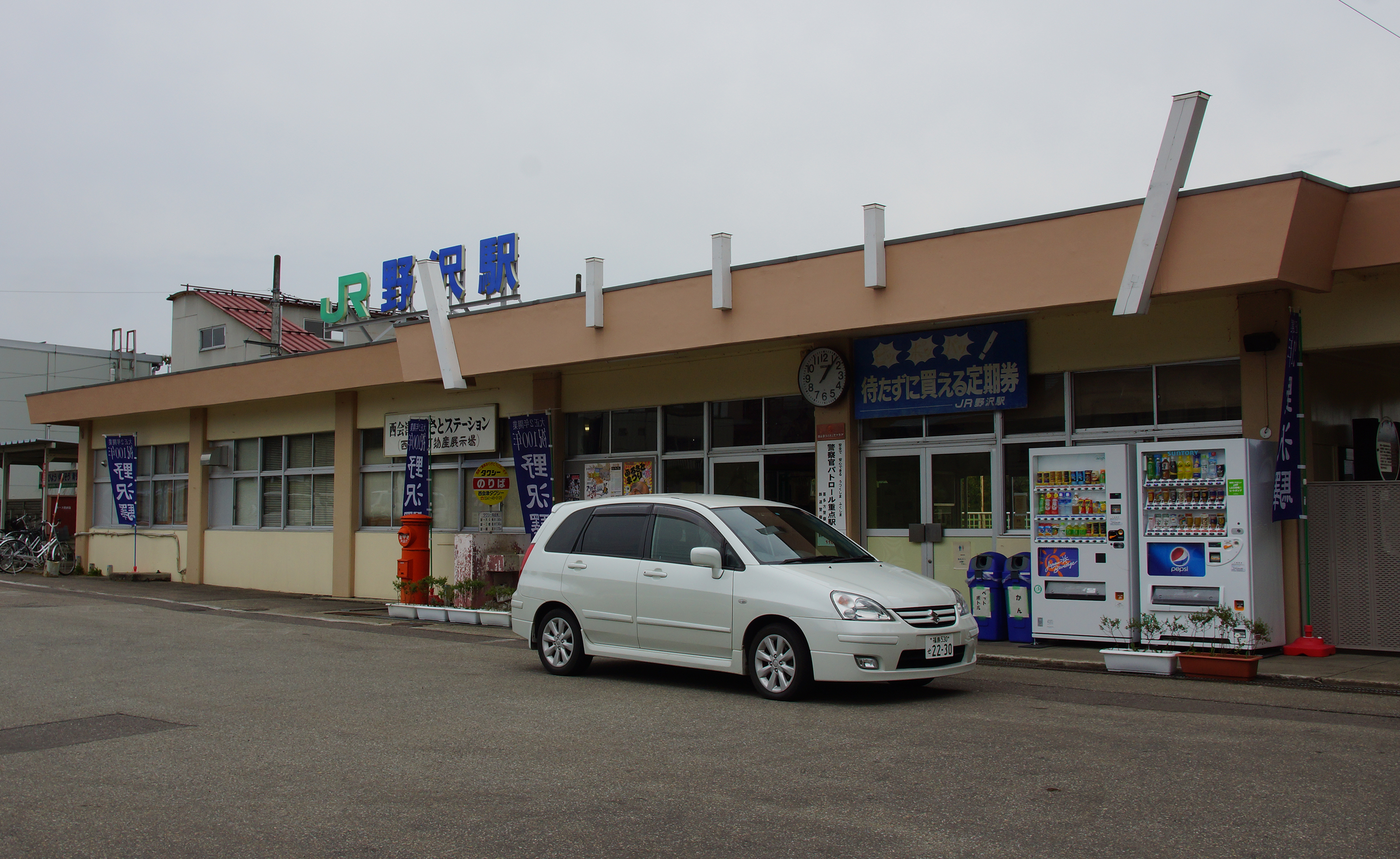 野沢駅（2013年10月）